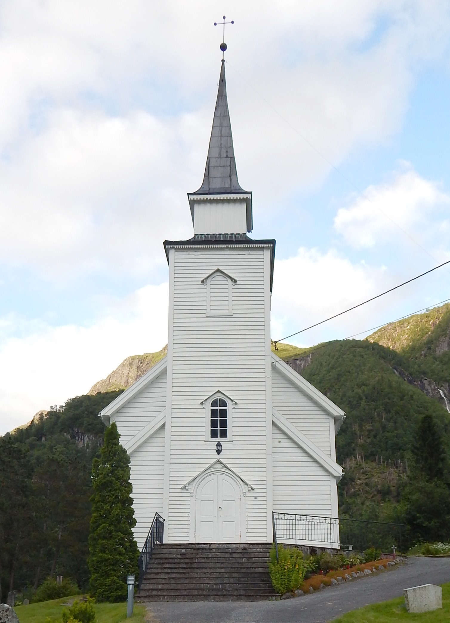 Hyen kirke